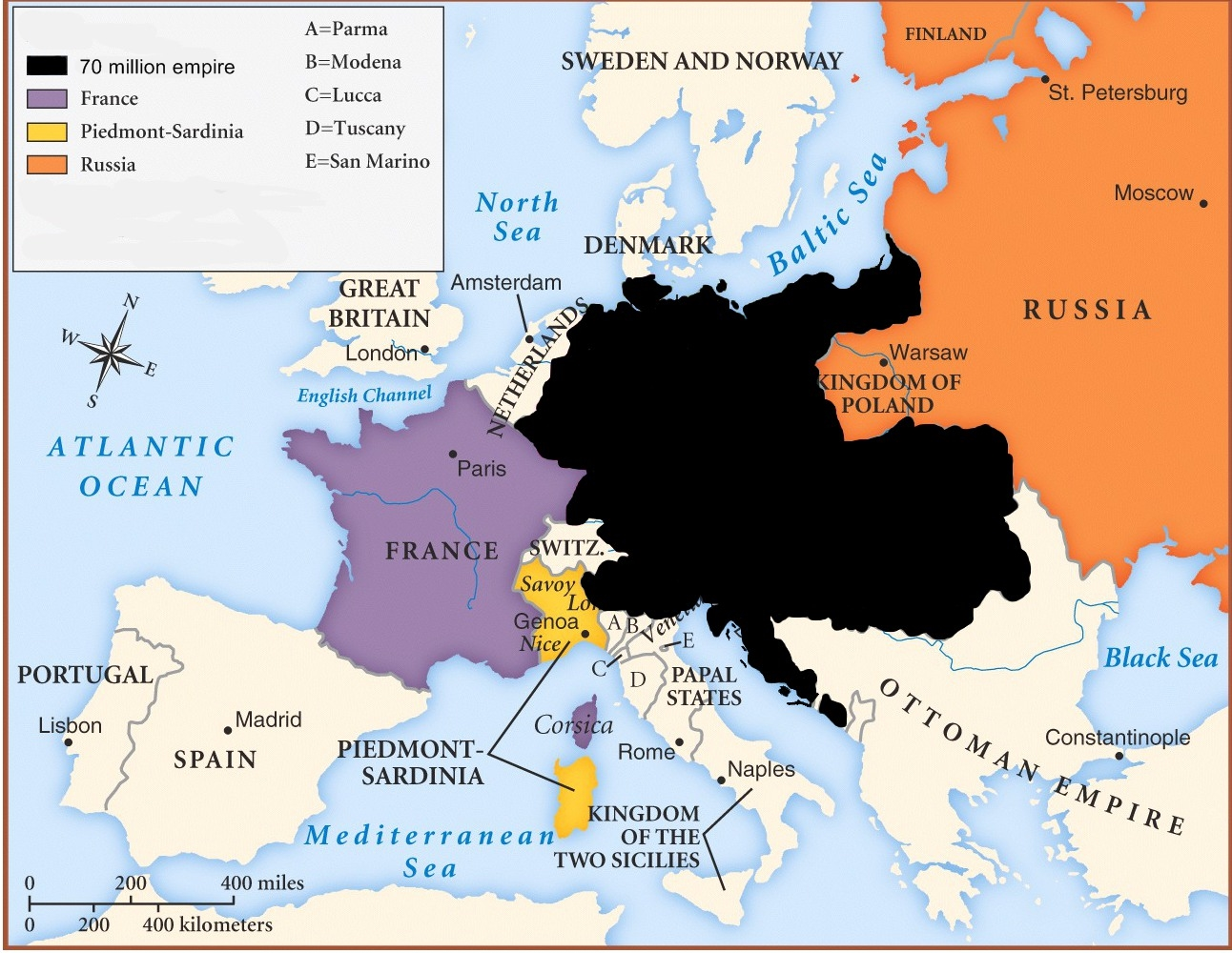 Diese Karte zeigt das geographische Ausmaß des von Felix zu Schwarzenberg ("Fürst zu Schwarzenberg") geforderte 70-Millionen Reiches.